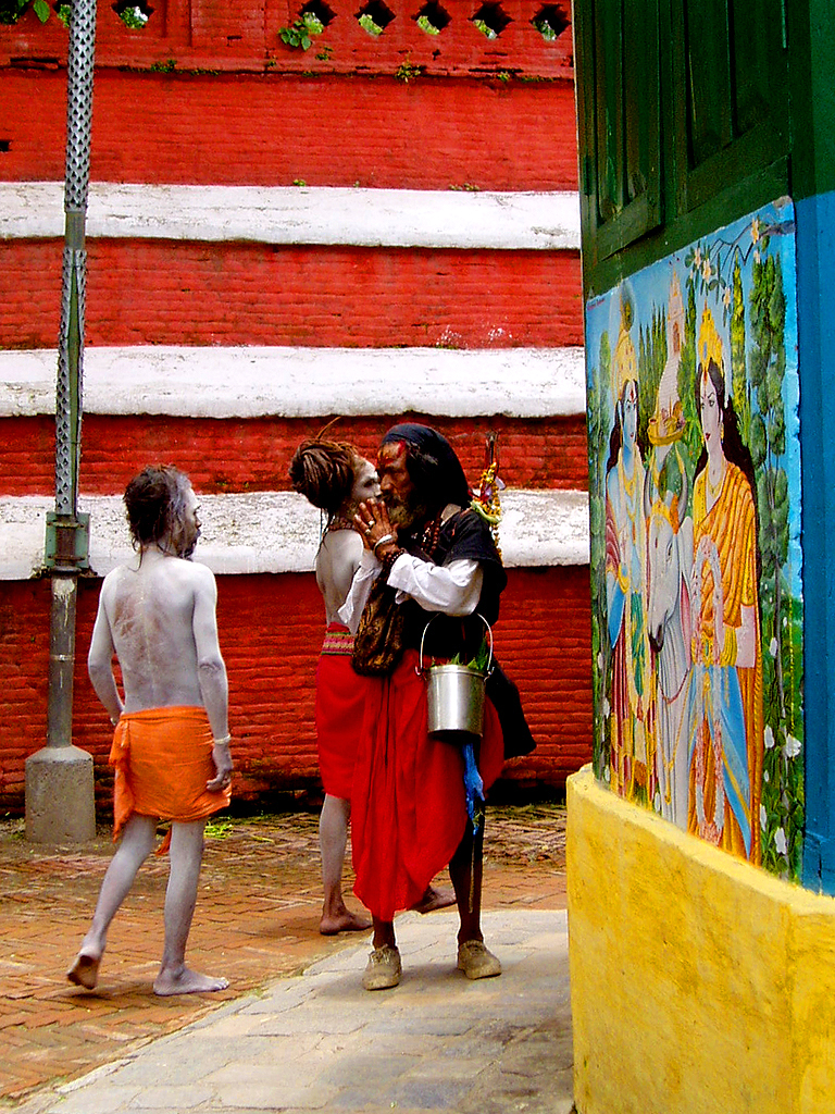 Pilgrim in Pashupatinath - Kathmandu, Nepal